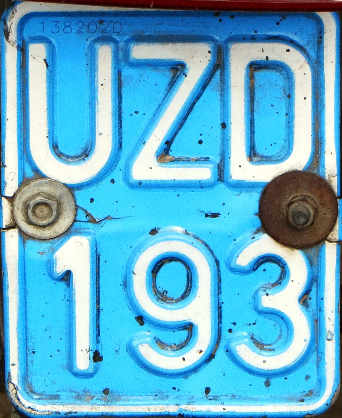 Kentekenplaat uit Cuba